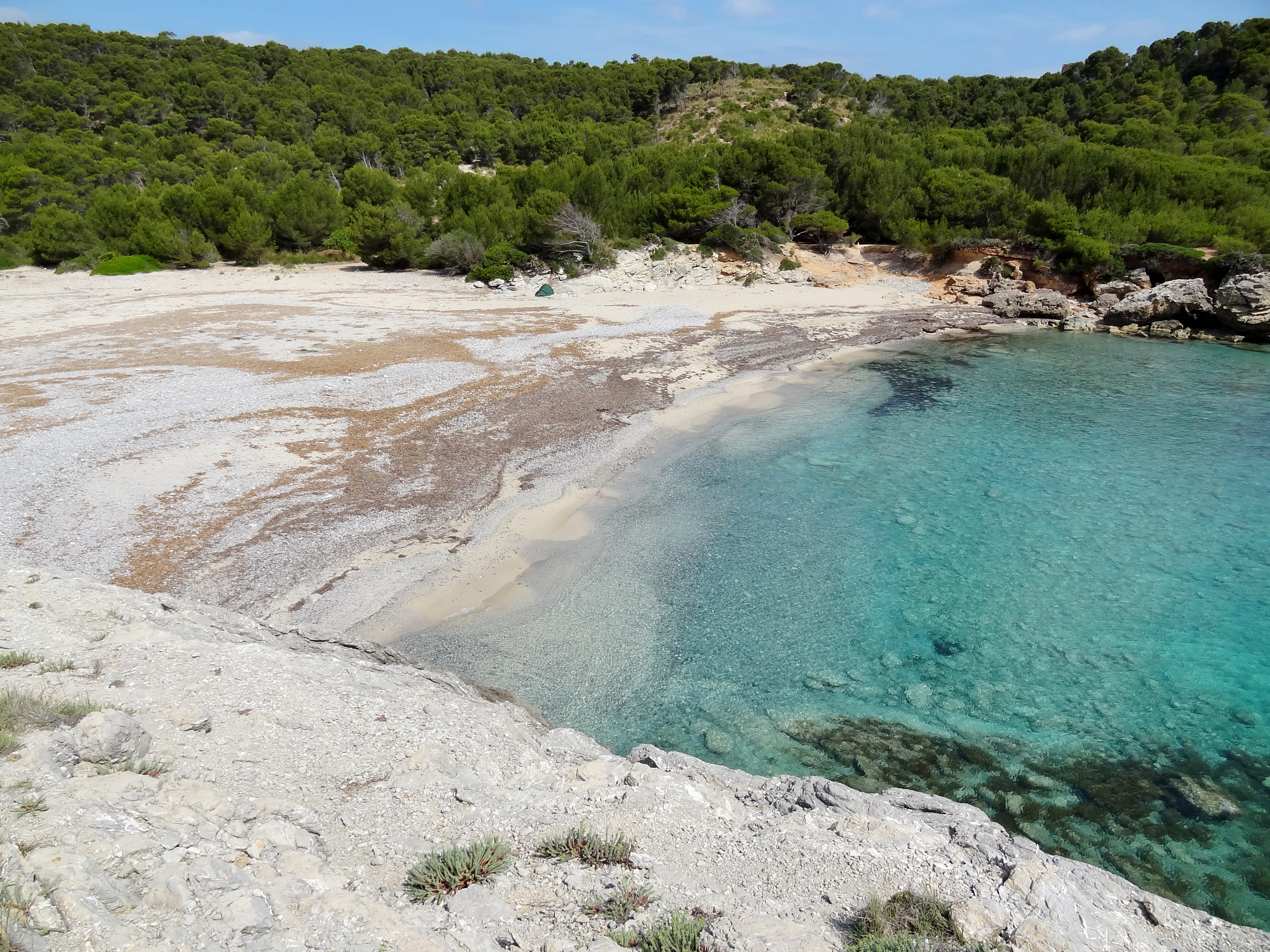 Cala des Matzoc, Gemeinde Artà, Mallorca, Spanien